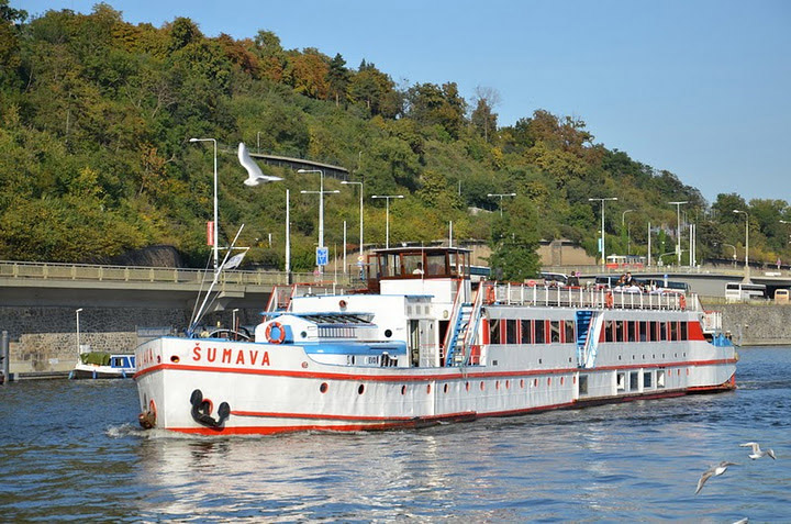 Loď Šumava